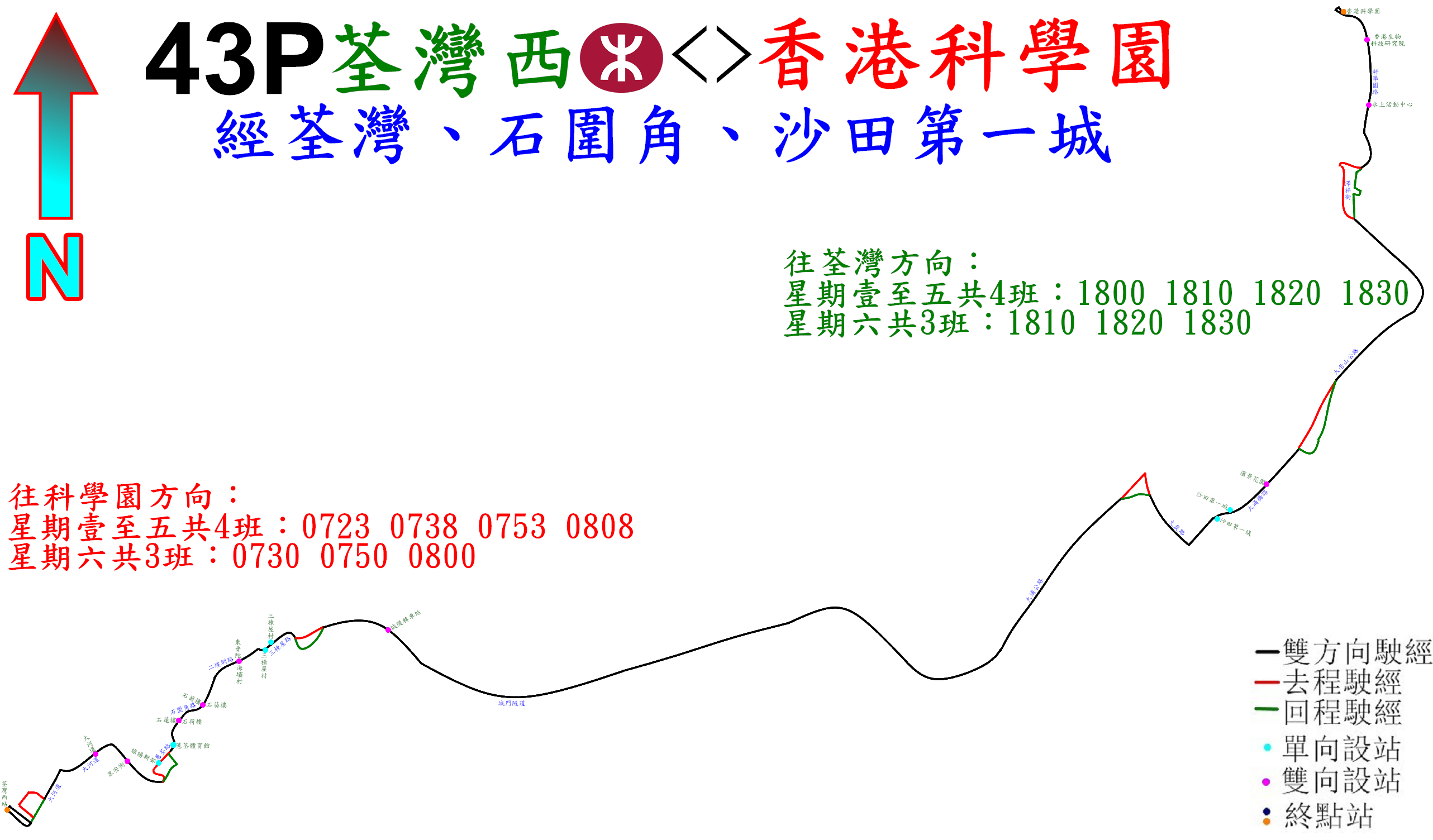 中文（香港）: 九巴43P線的走線圖